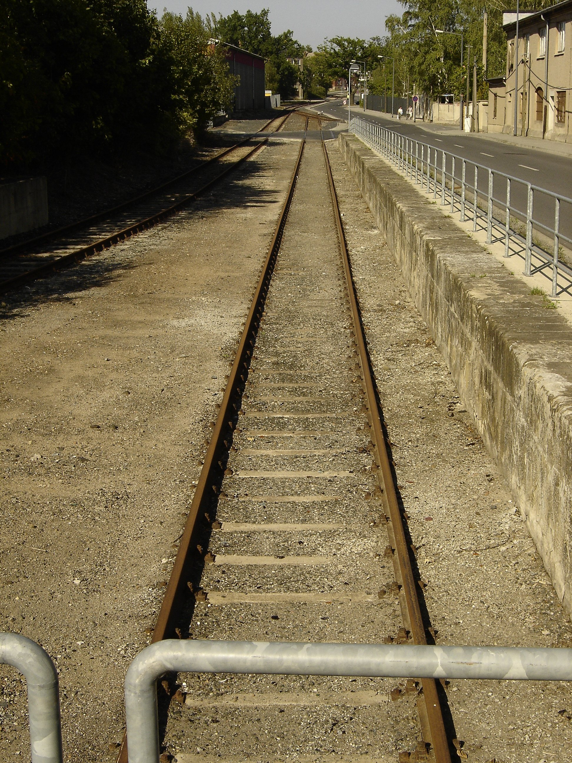 Zeugmeistereibahn in Dresden-Albertstadt